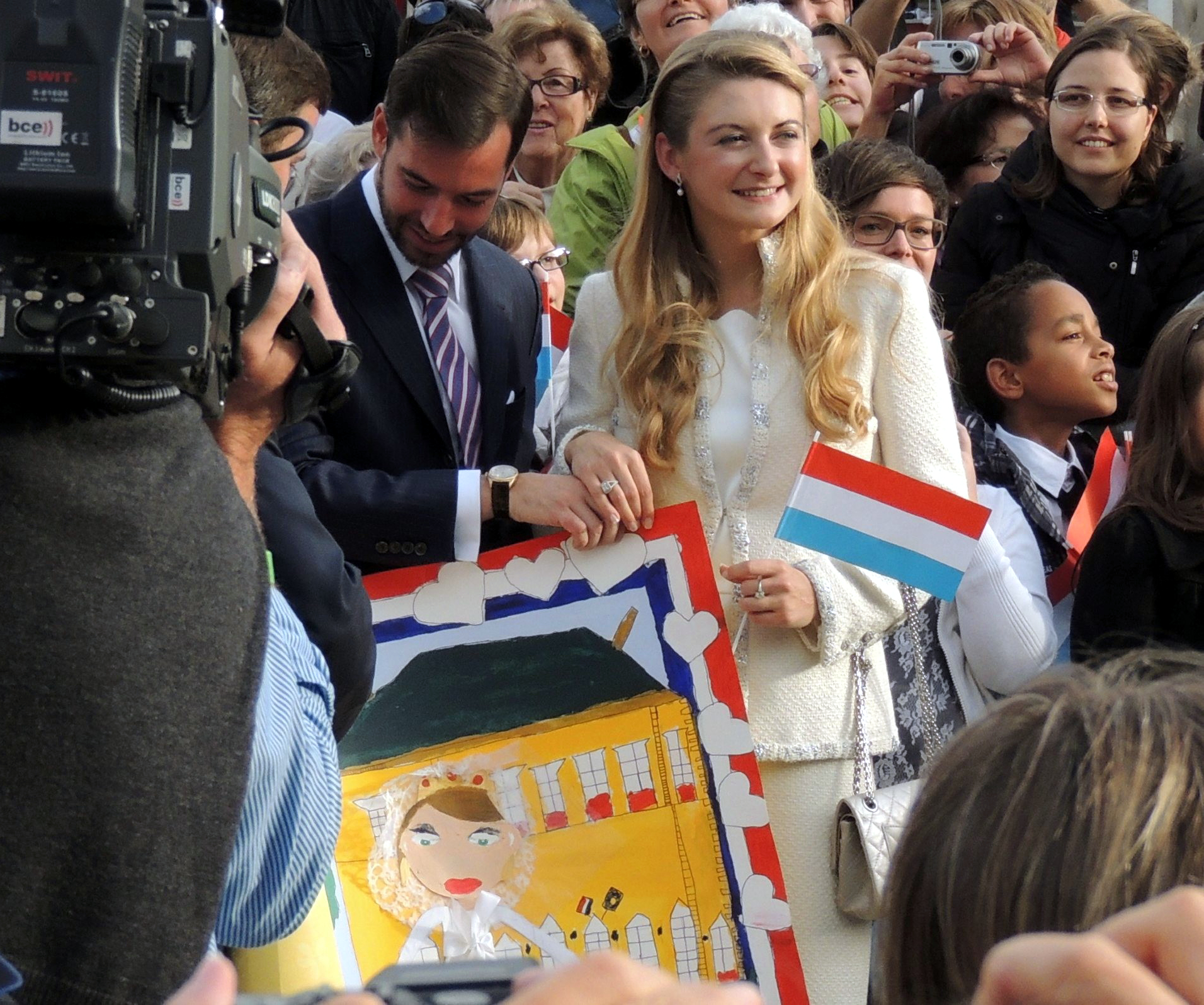 Den Ierfgroussherzog Guillaume an d'Stéphanie vu Lëtzebuerg no hirem zivile Bestietnes.